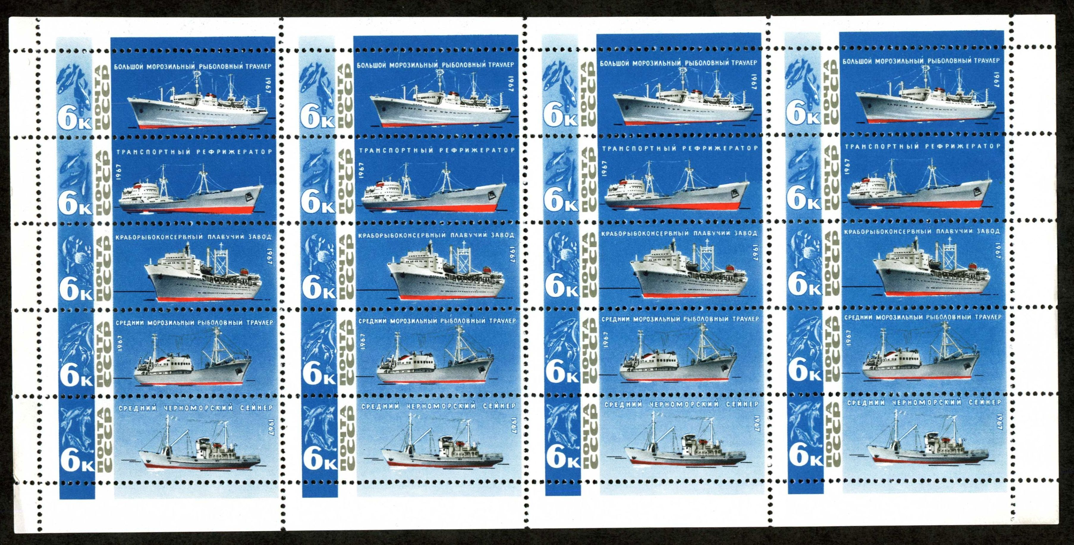 Лист почтовых марок СССР (Большой морозильный рыболовный траулер)